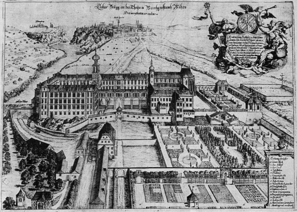 Klášter Louka u Znojma koncem 17. století